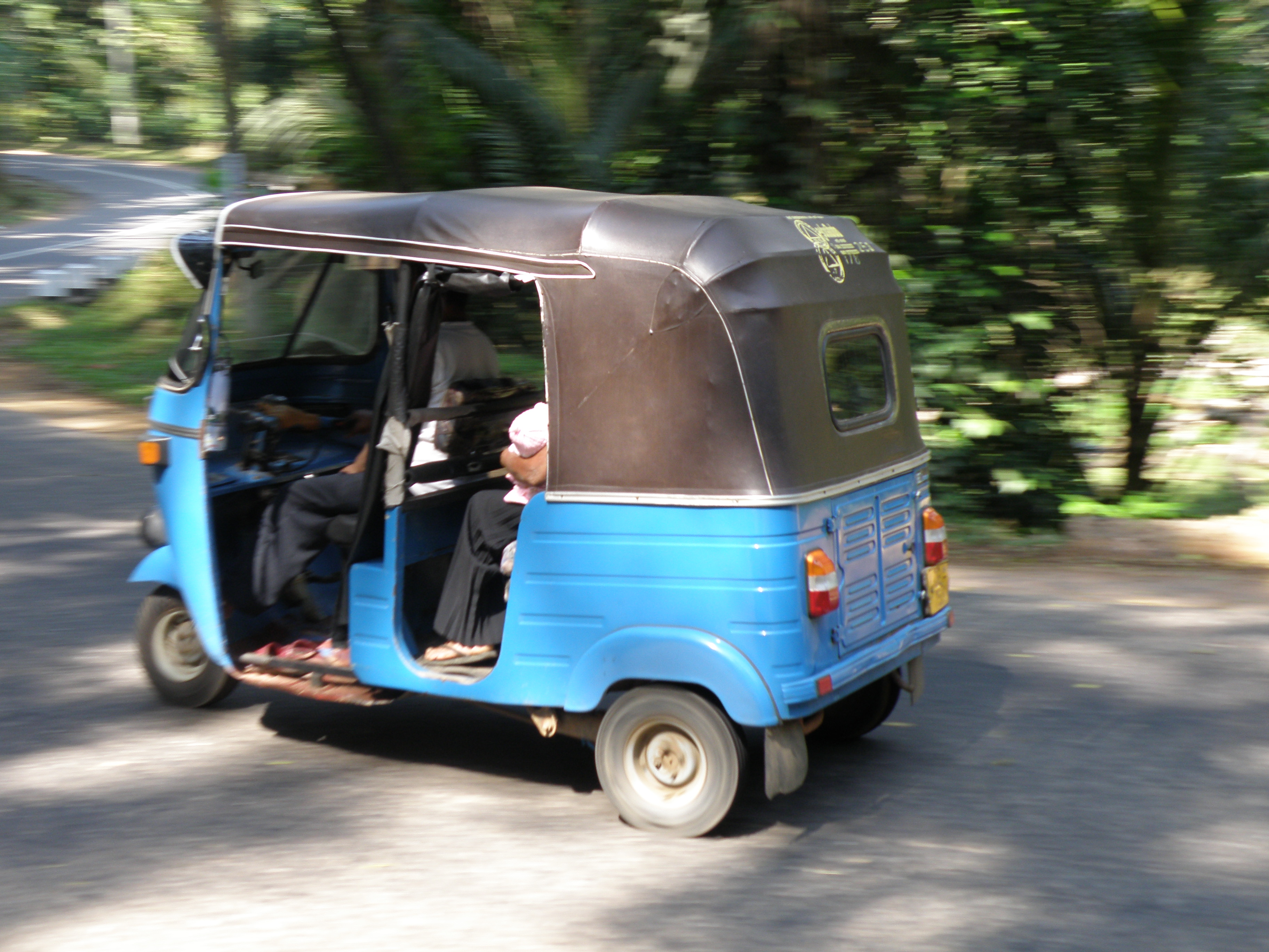 L'un des 260 000 tuk-tuks qui encombrent les routes du Sri Lanka !